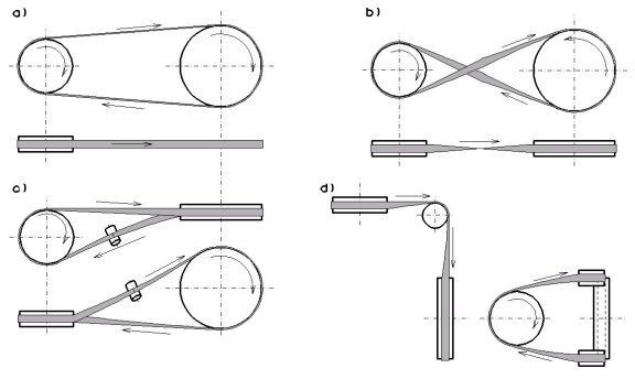 Lamerihmülekanne